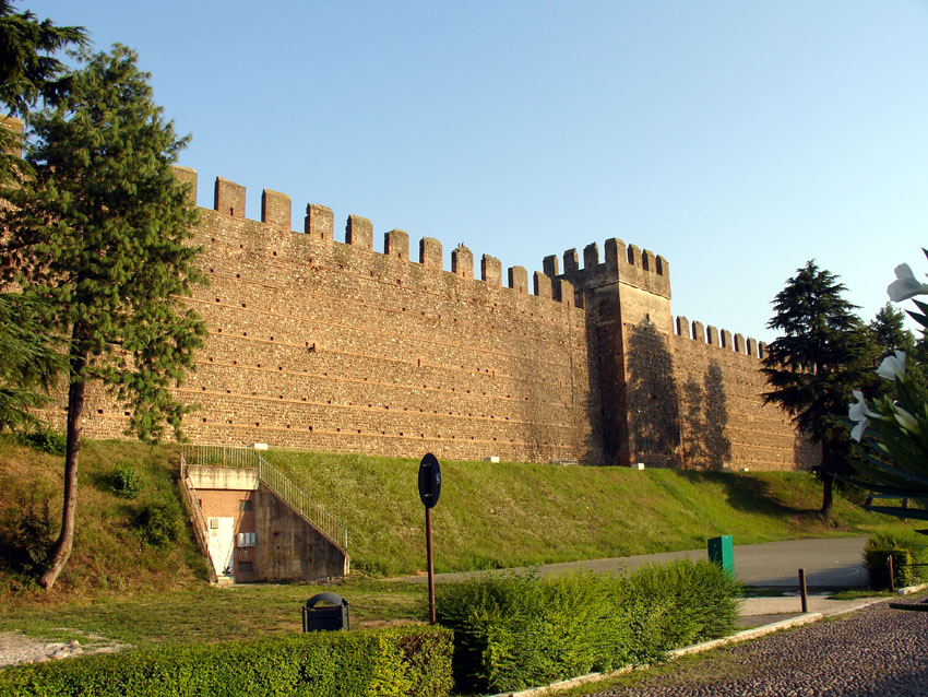 Serraglio di Villafranca di Verona. Il resto delle mura conservate a Villafranca.